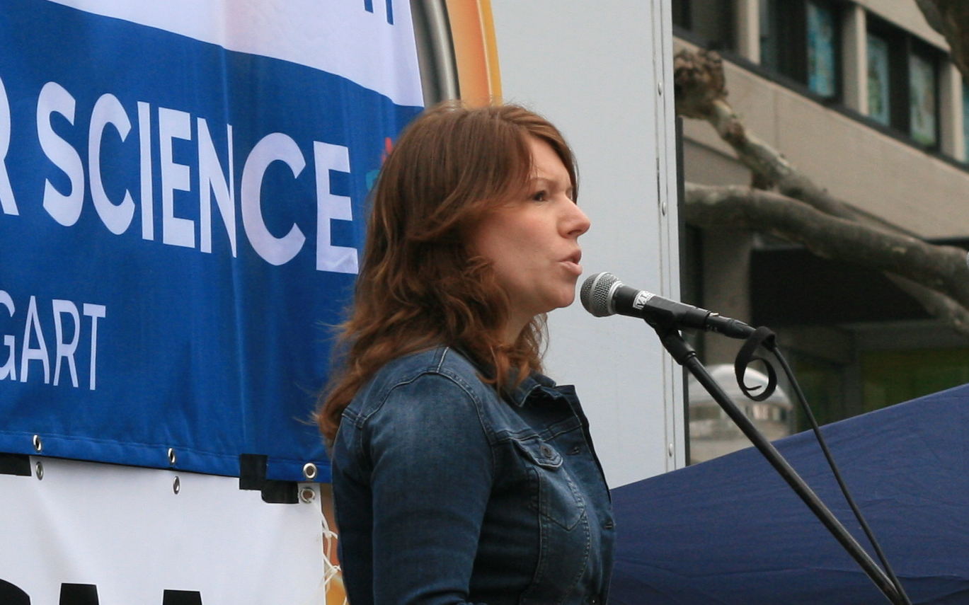 Dr. Anna Christmann, Forscherin, Politikerin und Grundsatzreferentin im Wissenschaftsministerium beim March for Science in Stuttgart